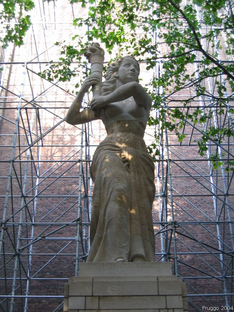 Foto door Fruggo, 28 augustus 2004, cc-by-1.0. Verzetsmonument (1949) by Corinne Franzén-Heslenfeld in Utrecht.